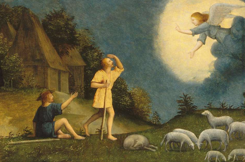 Anunciação aos pastores, detalhe de Adoração do Menino Deus de Bernardino Luini no Museu de Arte de Nova Orleães, EUA.